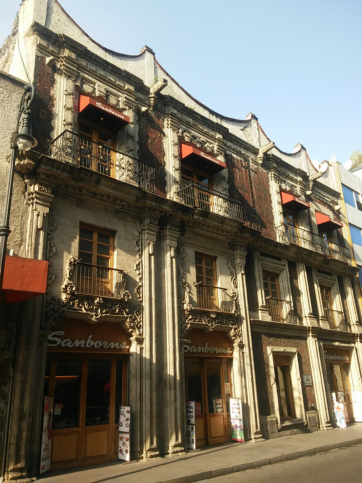 Casa del conde de San Bartolome de Xala en el Centro histórico de la Ciudad de México